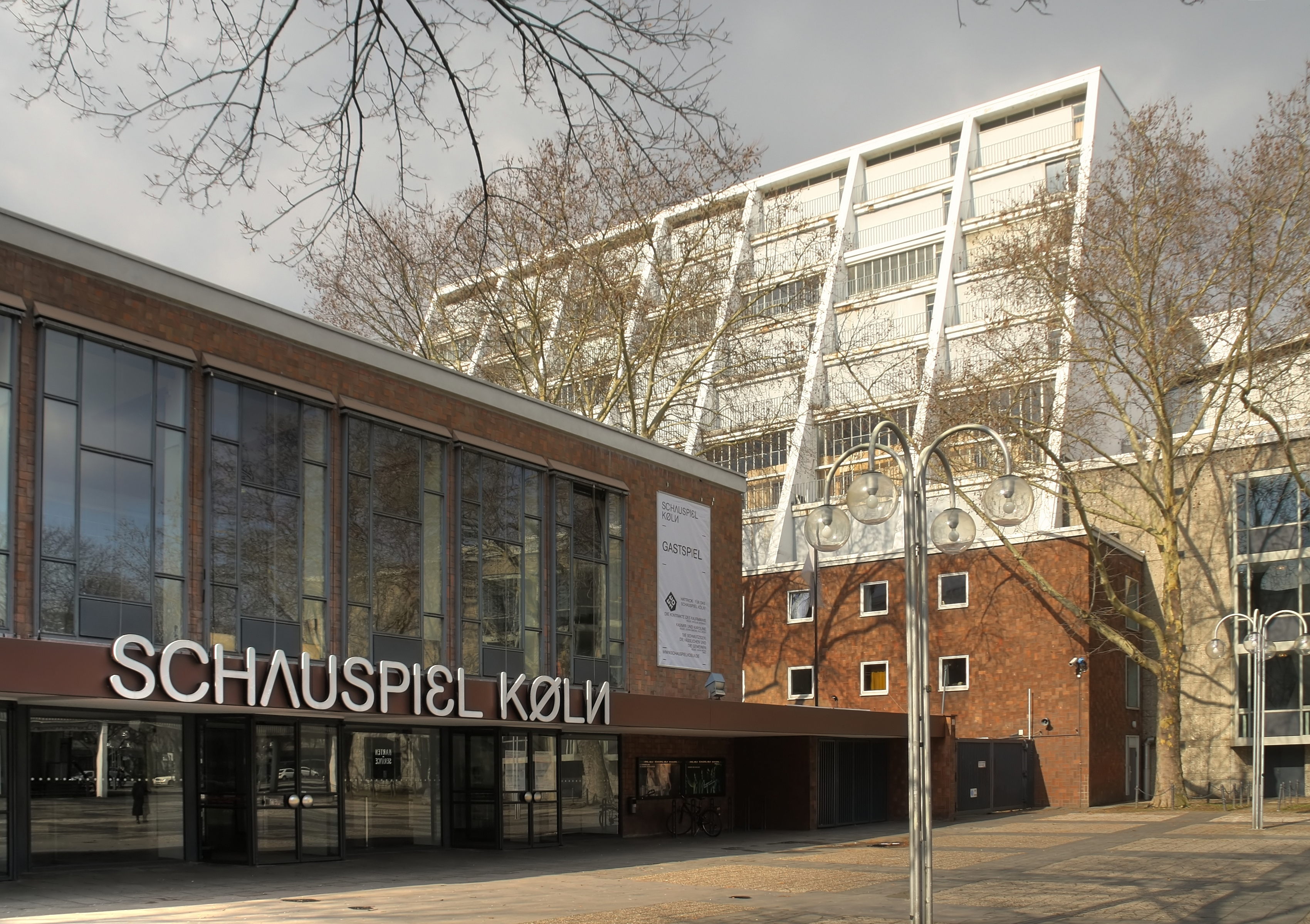 Schauspiel Köln, im Hintergrund die Oper Köln. Architekt beider Gebäude: Wilhelm Riphahn